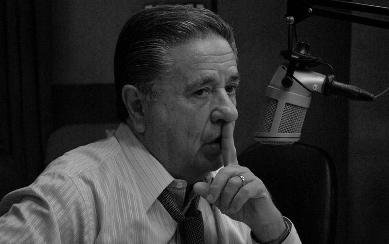 Popular Union presidential candidate Eduardo Duhalde ponders a response during a Cadena 3 radio station interview.